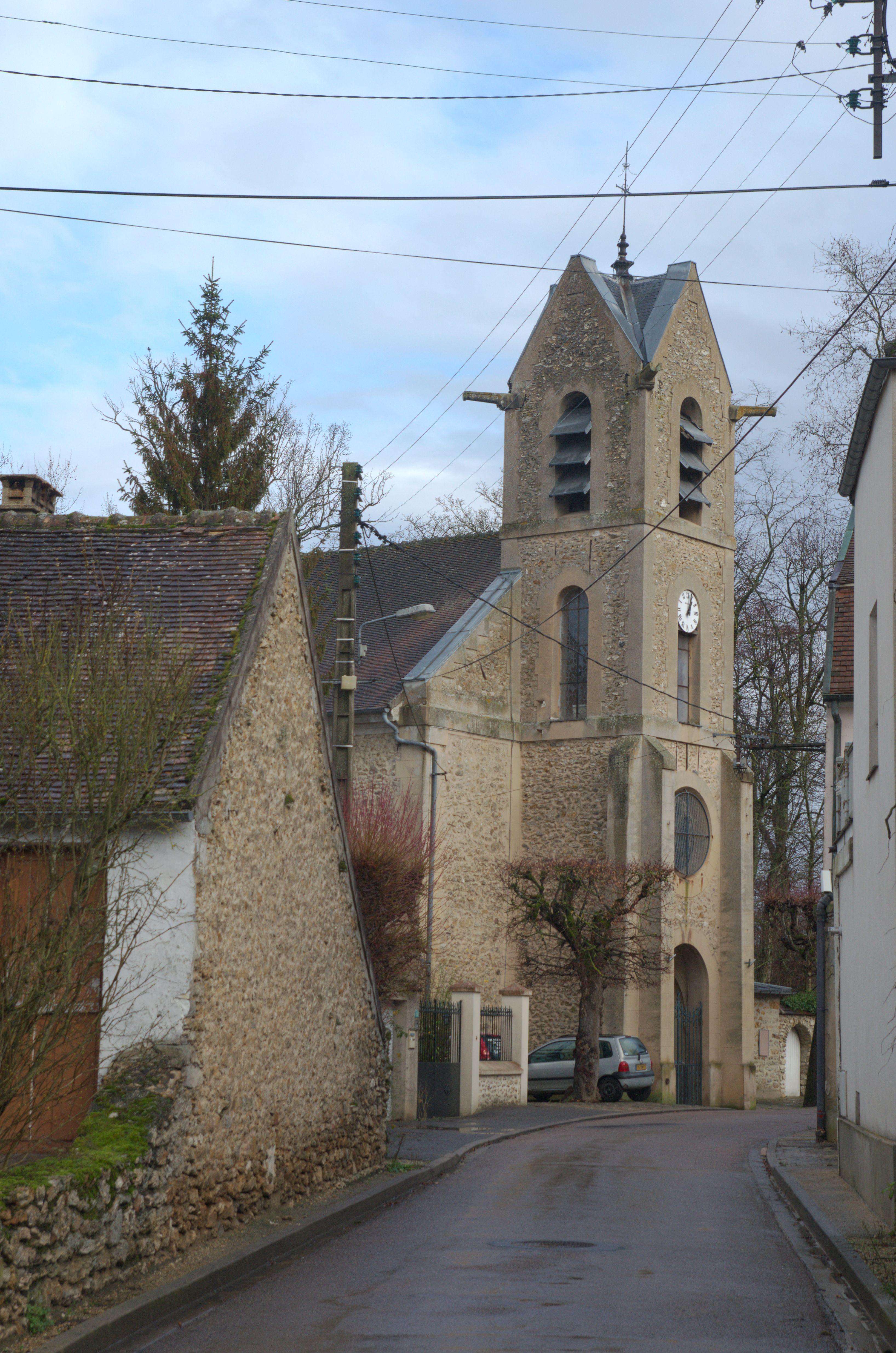 Église Notre-Dame-de-la-Nativité, rue de l’Église, depuis le carrefour avec la rue Jean Méchet. Le Mée-sur-Seine, Seine-et-Marne, France.